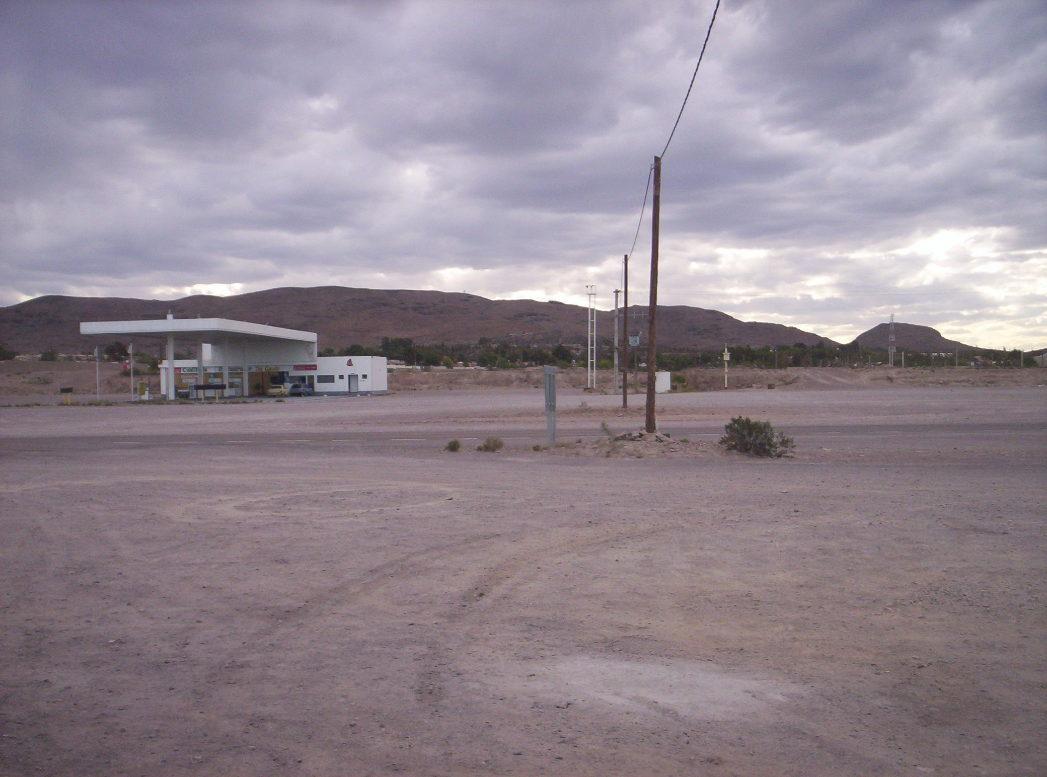 Vista de la sierra que bautiza al pueblo